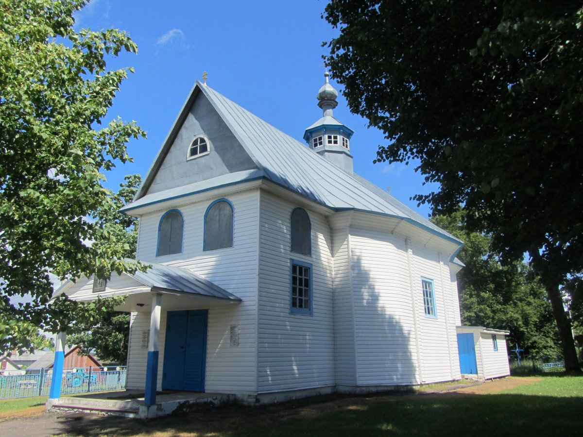 Ляхавічы. Спаса-Узнясенская царква